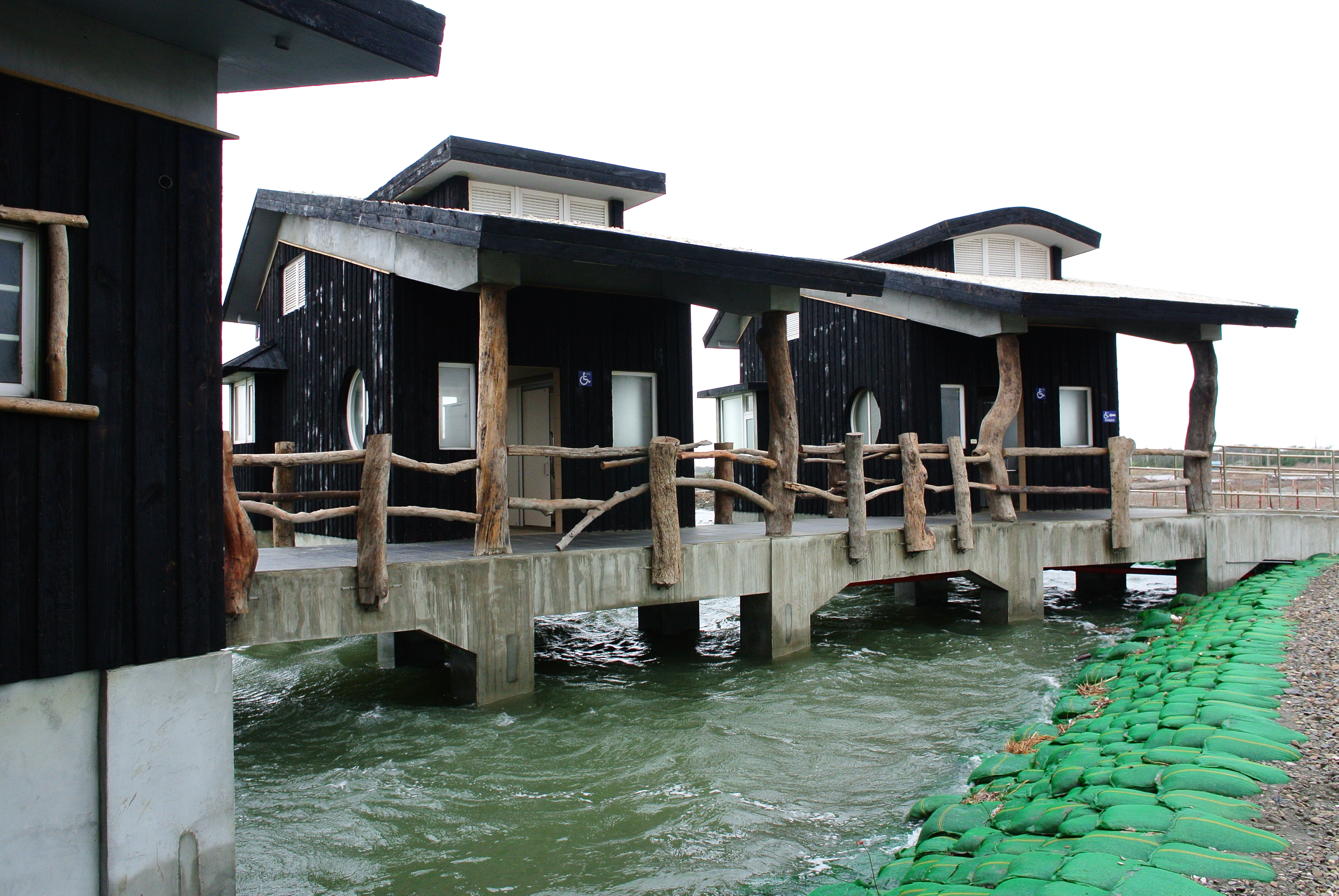 中文（台灣）: 雲林縣臺西鄉臺西海口生活館。